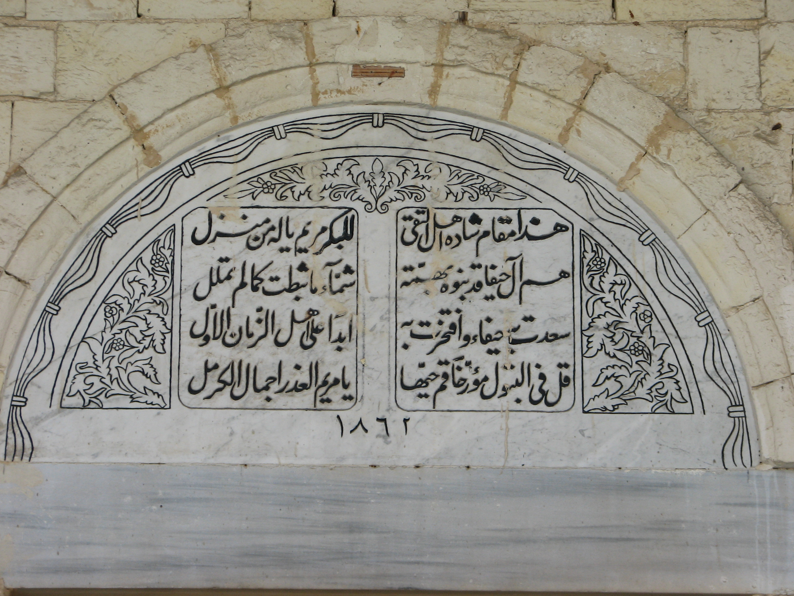 House of Grace, Haifa, Israel הכנסייה היוונית-קתולית הקימה בשנת 1859 כנסייה בשם "א-סיידה" (כנסיית גבירתנו). היום משמש הבית מוסד שיקומי לאסירים משוחררים ובית מחסה לנשים נזקקות שוכן בשדרות הפלי"ם בעיר התחתית בחיפה כתובת מעל שער הכניסה המזרחי לכנסייה תרגום הטקסט: זהו בית תפילה שאותו בנו אנשים יראי שמיים הם בני חיפה שבנו אותו בשאיפה שבו הייתה חיפה מאושרת ובו התגאתה לך בעקבות הבתולה וברכהּ לשלום לבתולה מרים מה טוב הבית נעלה שלא רפתה ולא נלאתה מעולם לעומת בני הדור שקדמו להם הו מרים הבתולה, יפת הכרמל